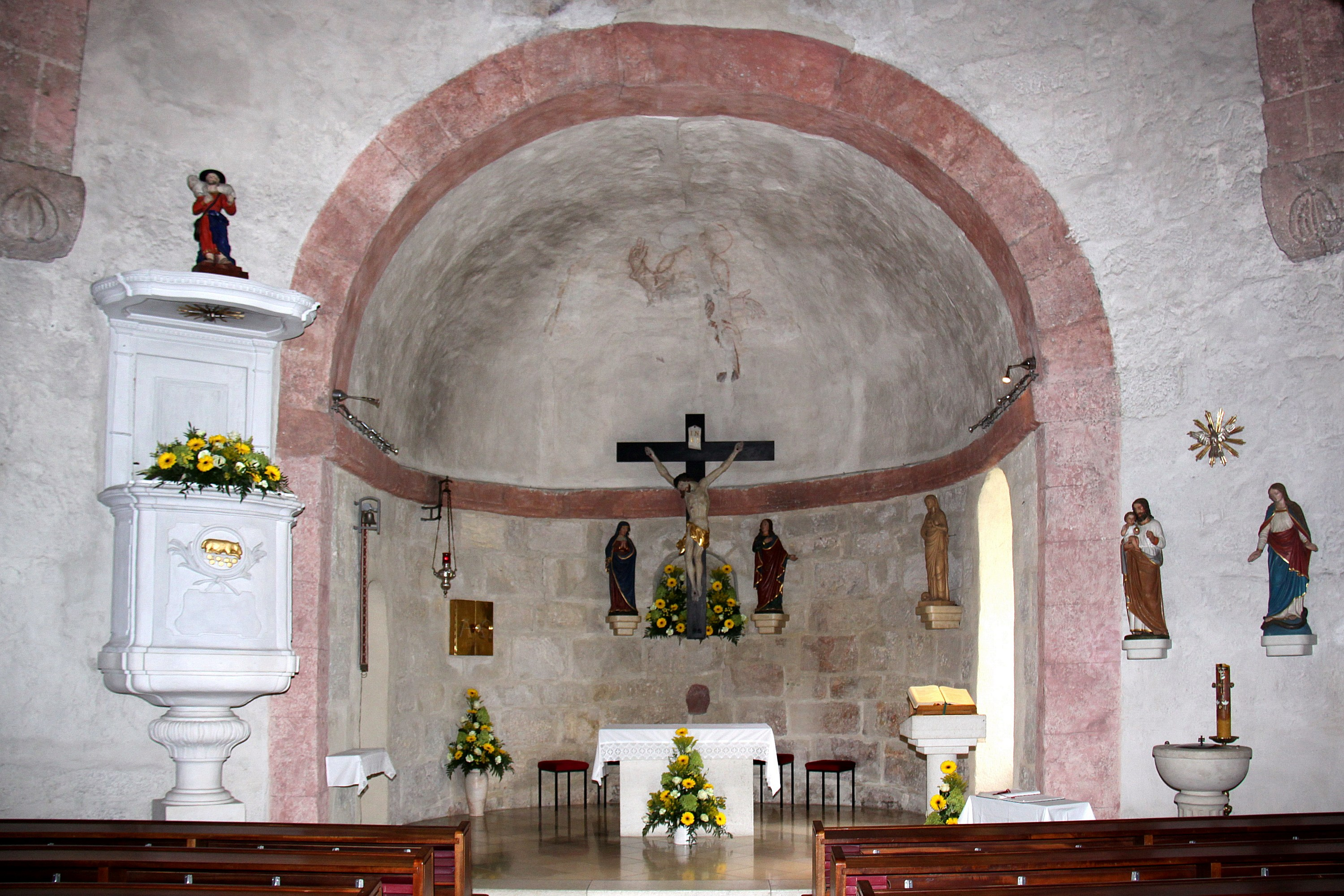 Denkmalgeschützte römisch-katholische Pfarrkirche hl. Maria Magdalena in Scheiblingkirchen-Thernberg.